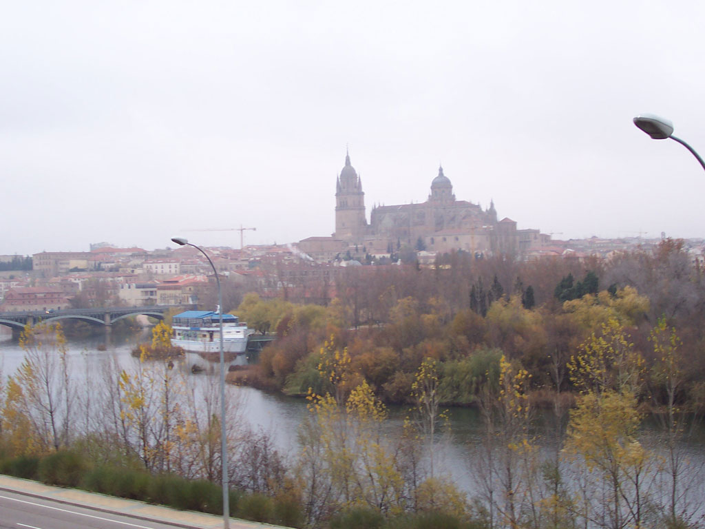 El río Tormes a su paso por Salamanca